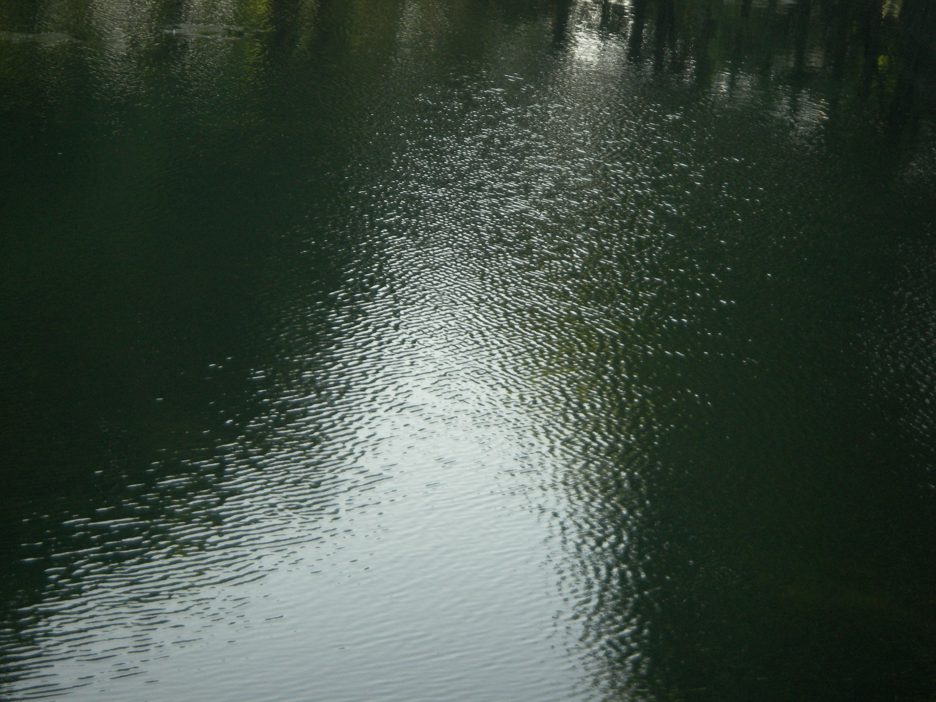 Рябь на воде (Таврический сад, Санкт-Петербург)